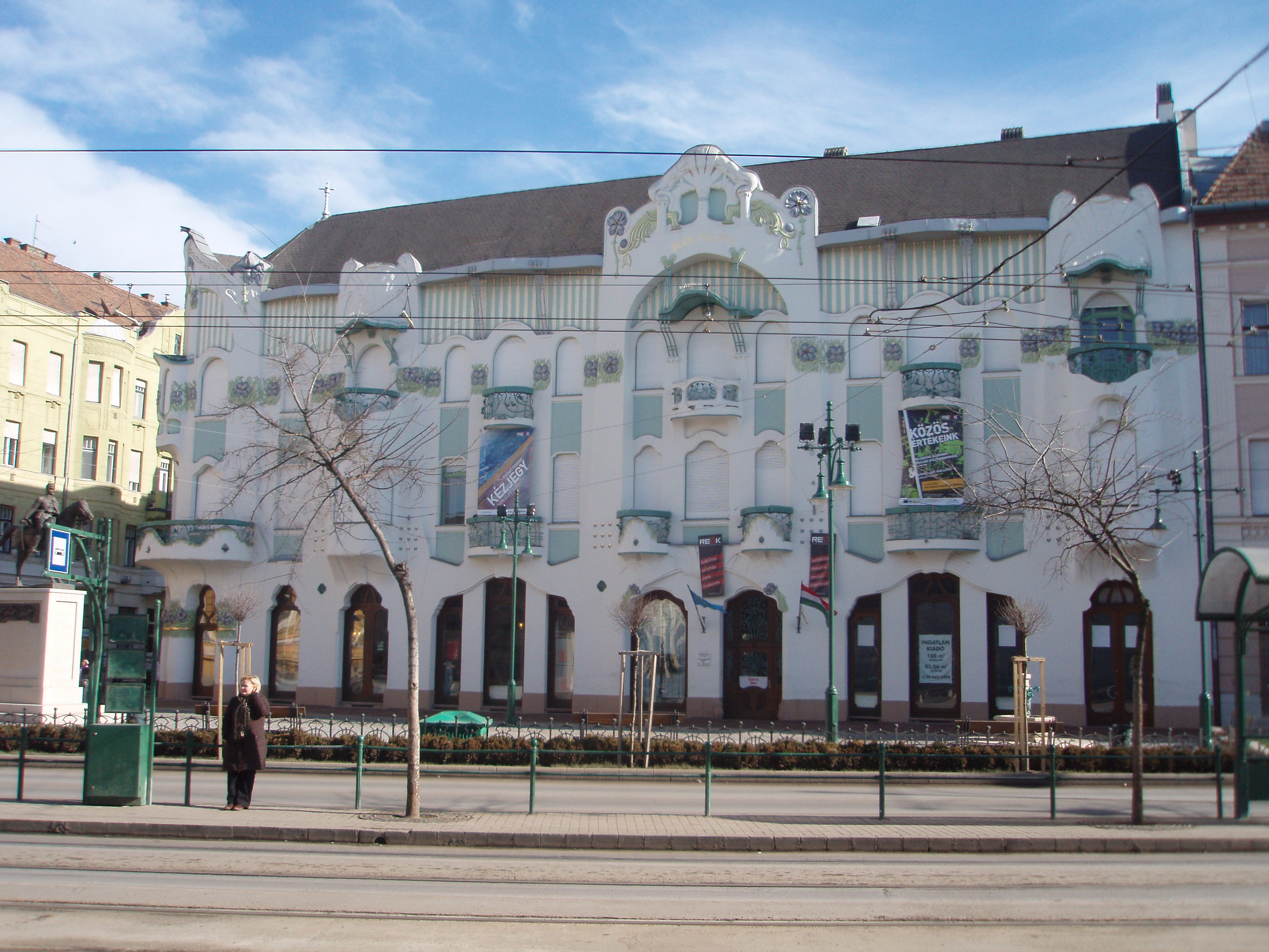 Palata Reok (Reok palota)